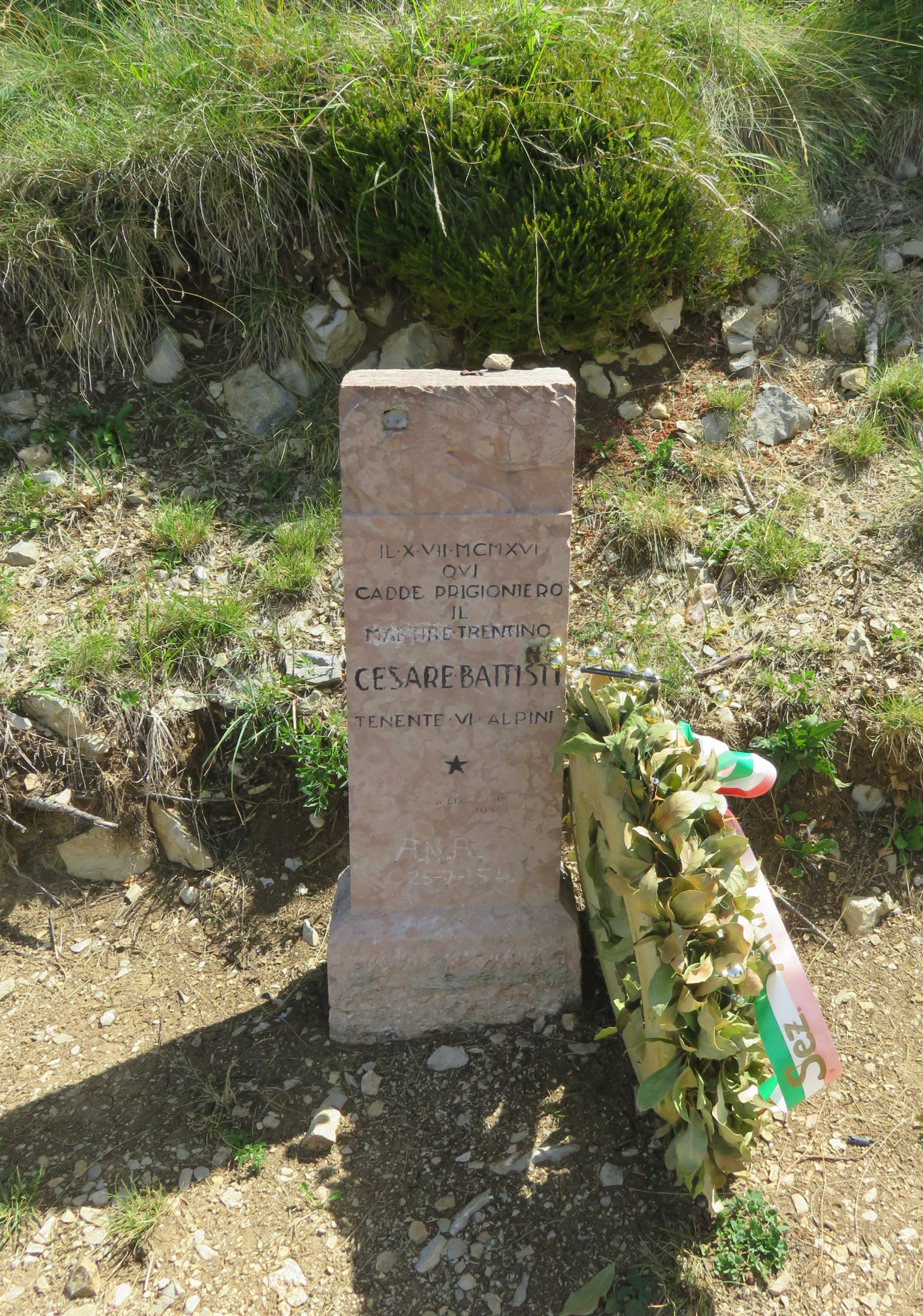 Selletta Battisti. Lapide Cesare Battisti